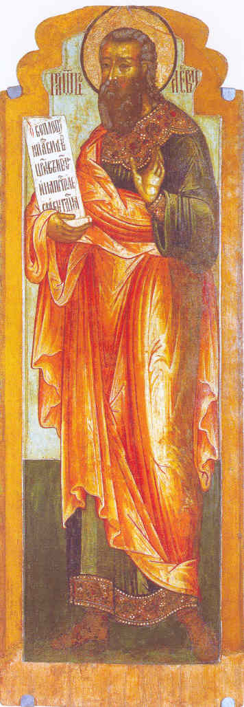 Праотец Левий Из праотеческого ряда. Василий Осипов (Игнатьев) и другие.